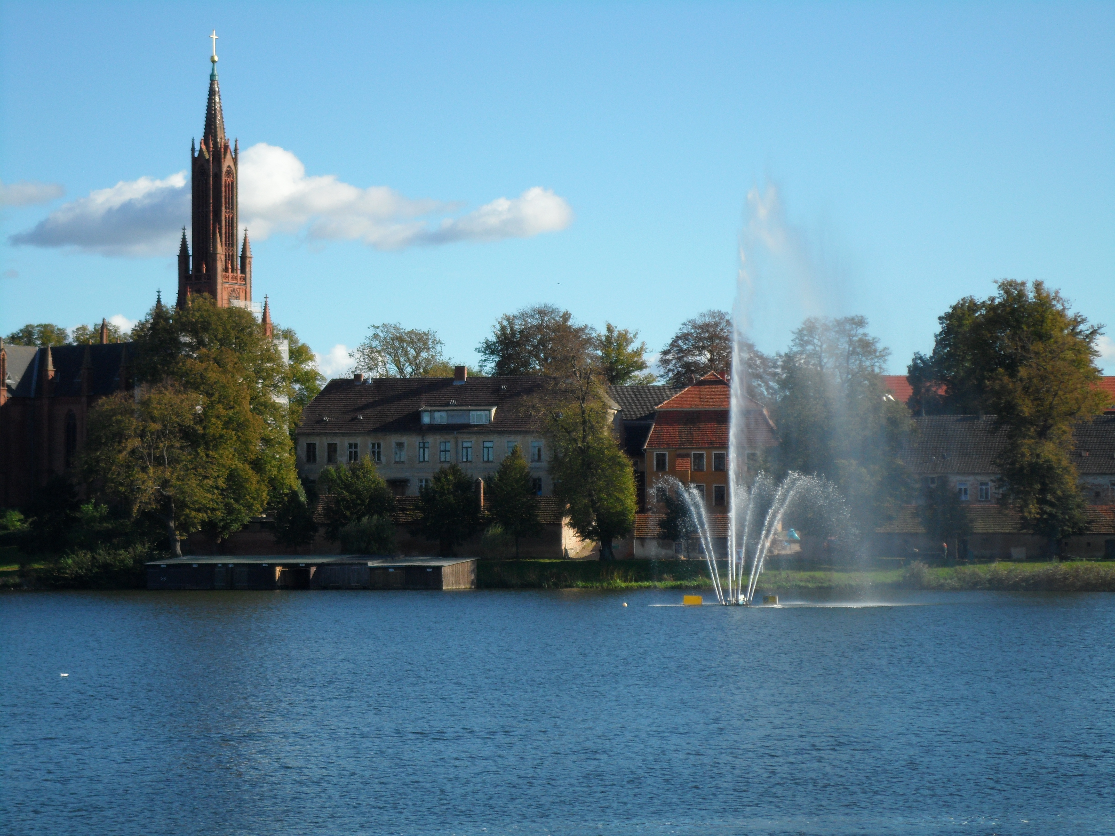 Klosterkirche Malchow